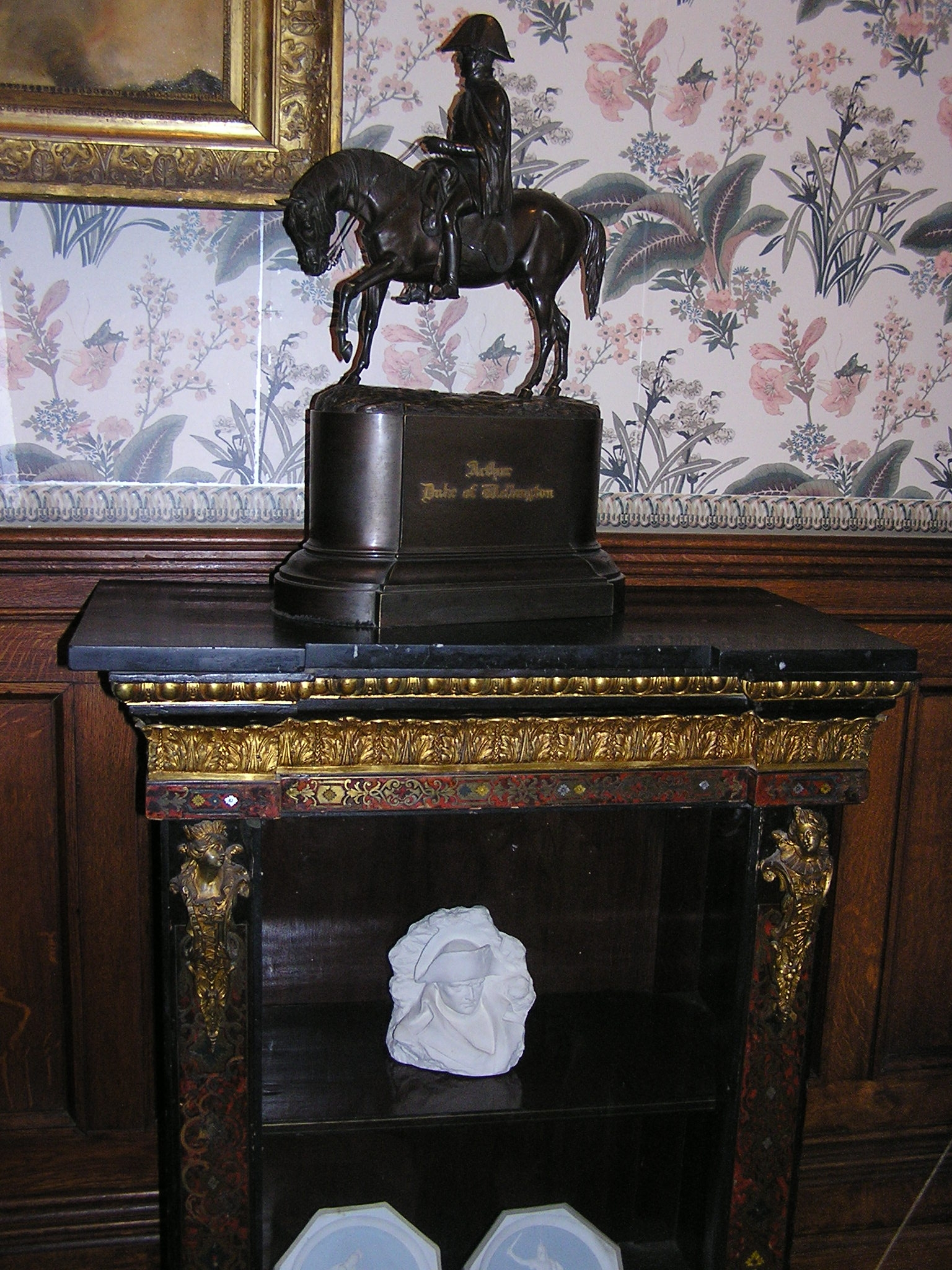 Алупка. Воронцовский дворец